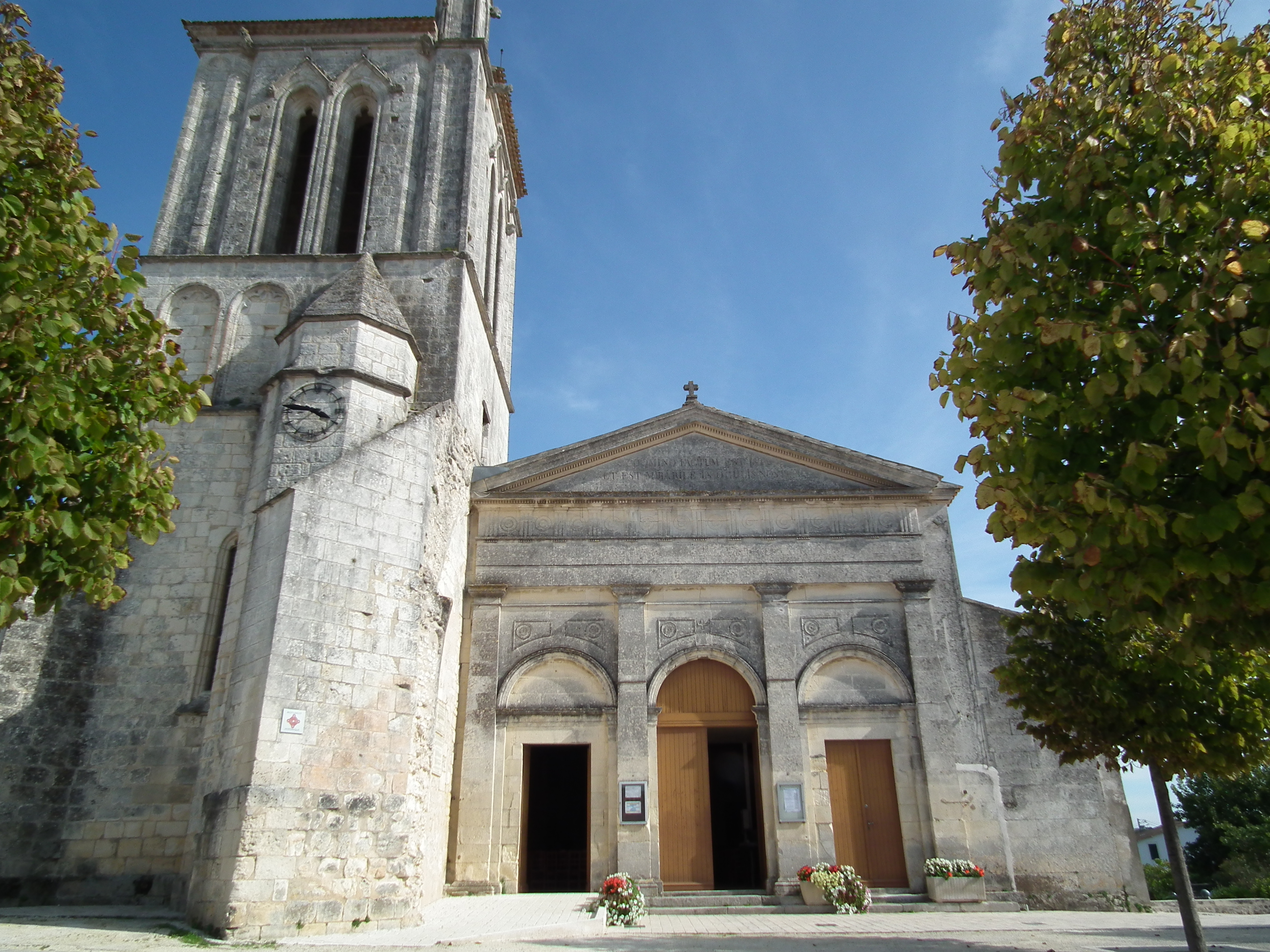 Façade de l'église de Meschers-sur-Gironde